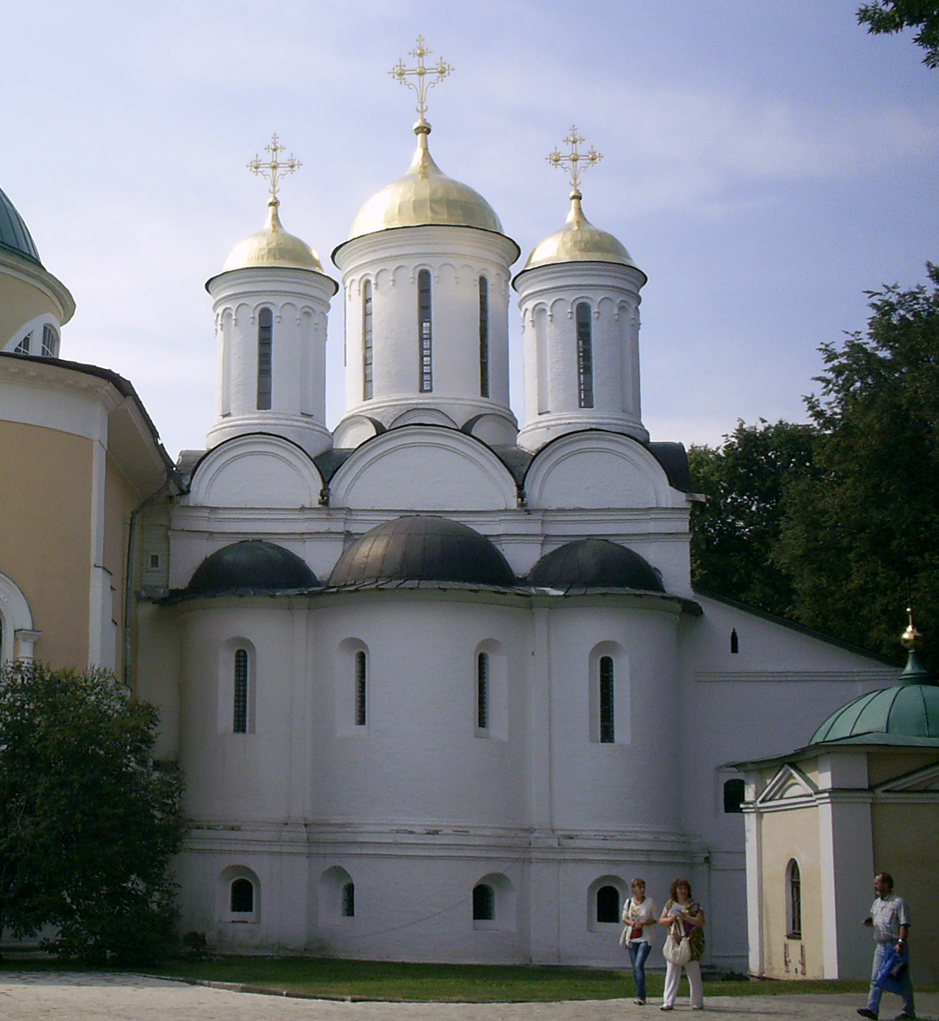 Собор Спасо-Преображенский: площадь Богоявленская, 25, Ярославль, Ярославская область